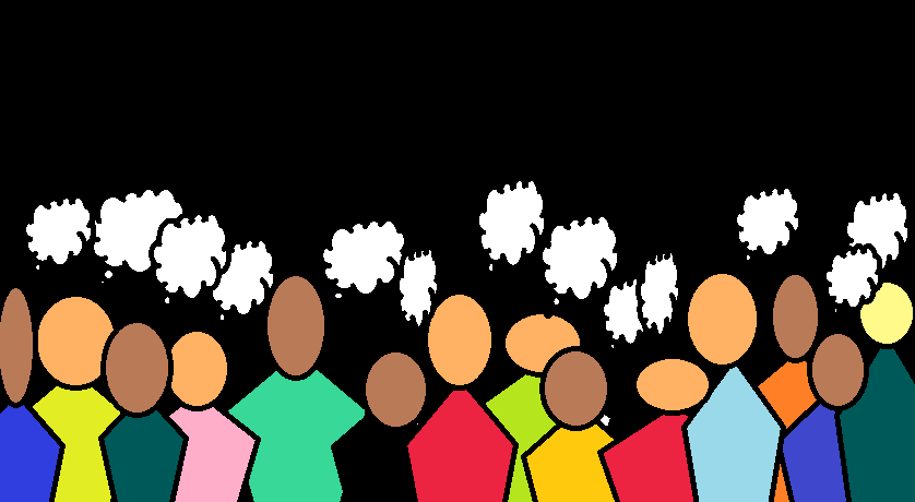 Pensiero collettivo